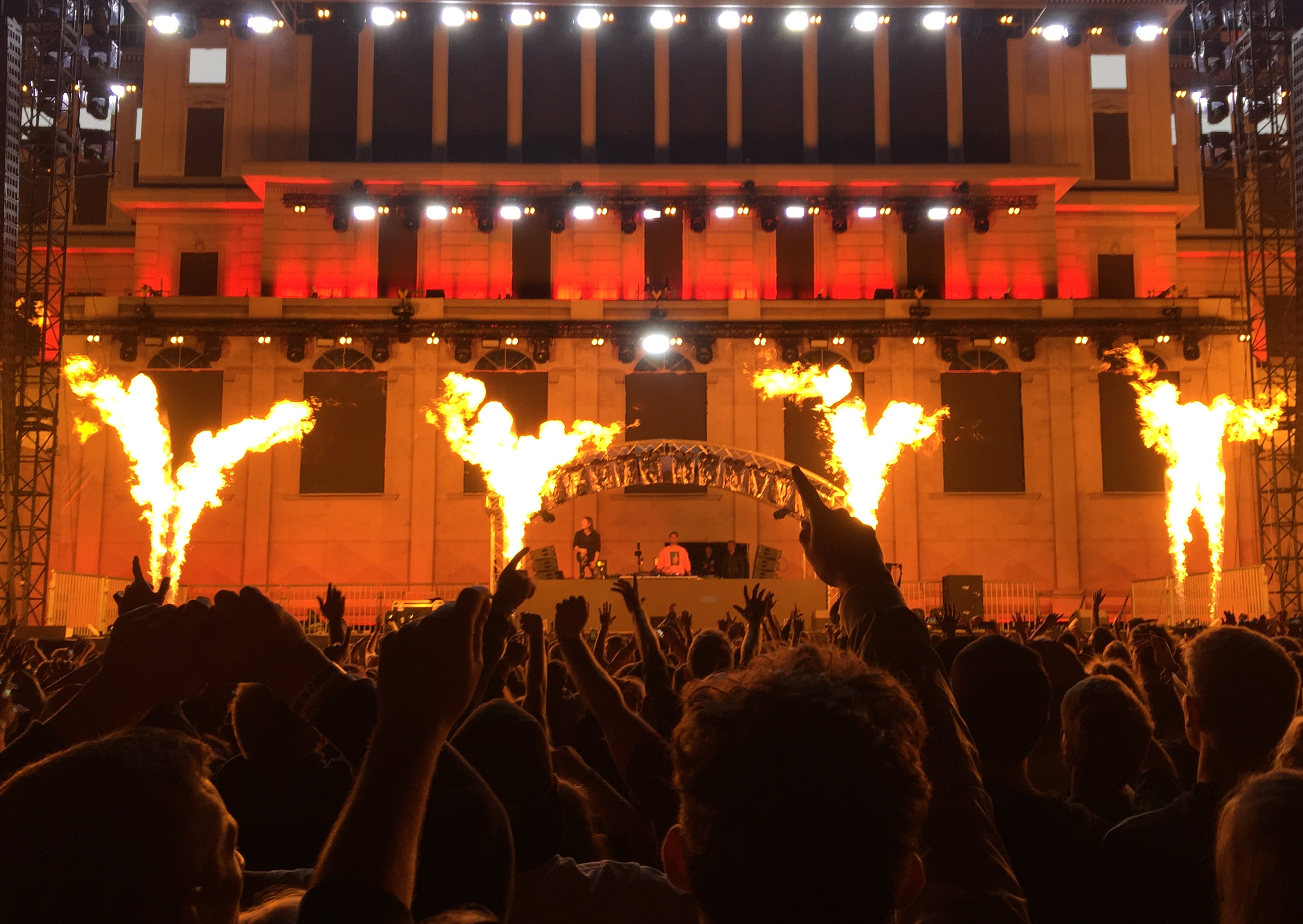 Axwell Λ Ingrosso playing live on Mainstage of Airbeat One Festival 2017.